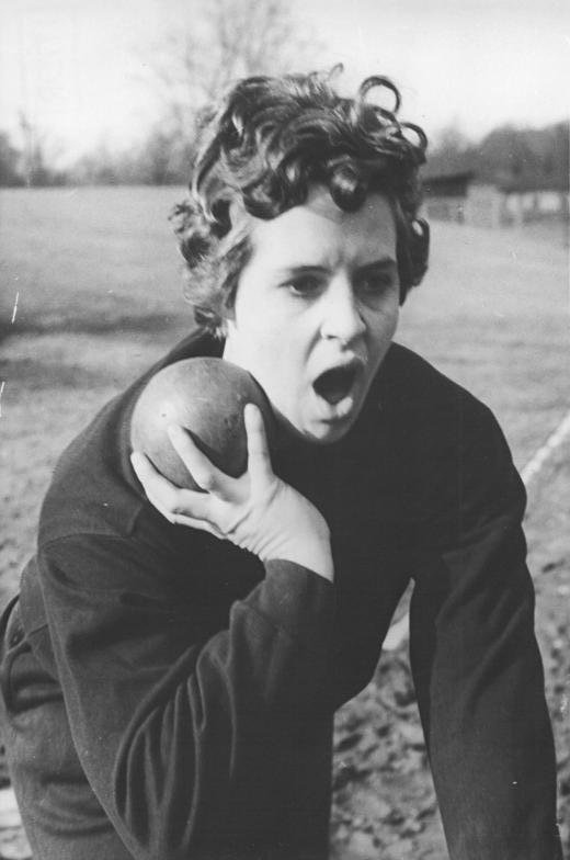 Margitta Heimboldt Zentralbild Schaar 25.03.1963 Leichtathleten schon in guter Verfassung. In guter Verfassung stellten sich einige deutsche Leichtathleten am 23.03.1963 in Leipzig bei dem ersten Freiluftstart in diesem Jahr vor. UBz: Im Kugelstoßen der Damen seigte Margitta Heimboldt (SC DHfK Leipzig) mit 15,44 m.